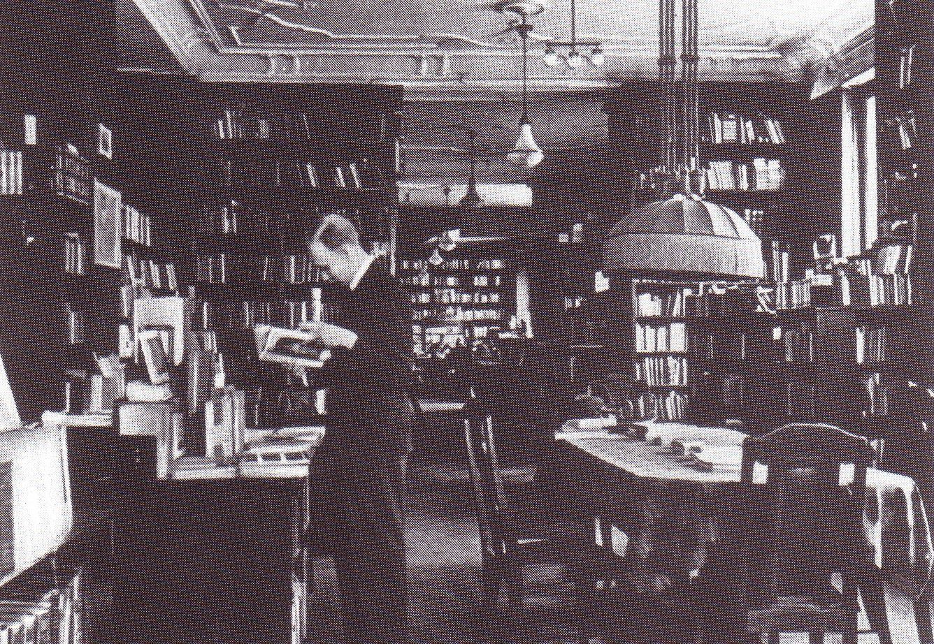 Ursprünglich war das Bild wohl in Kurt Forstreuter: Gräfe und Unzer. Zwei Jahrhunderte Königsberger Buchhandel. Königsberg 1932. Es zeigt die Verkaufsräume im ersten Stock, das Antiquariat und die wissenschaftliche Abteilung, im „Haus der Bücher“ am Paradeplatz (Königsberg)